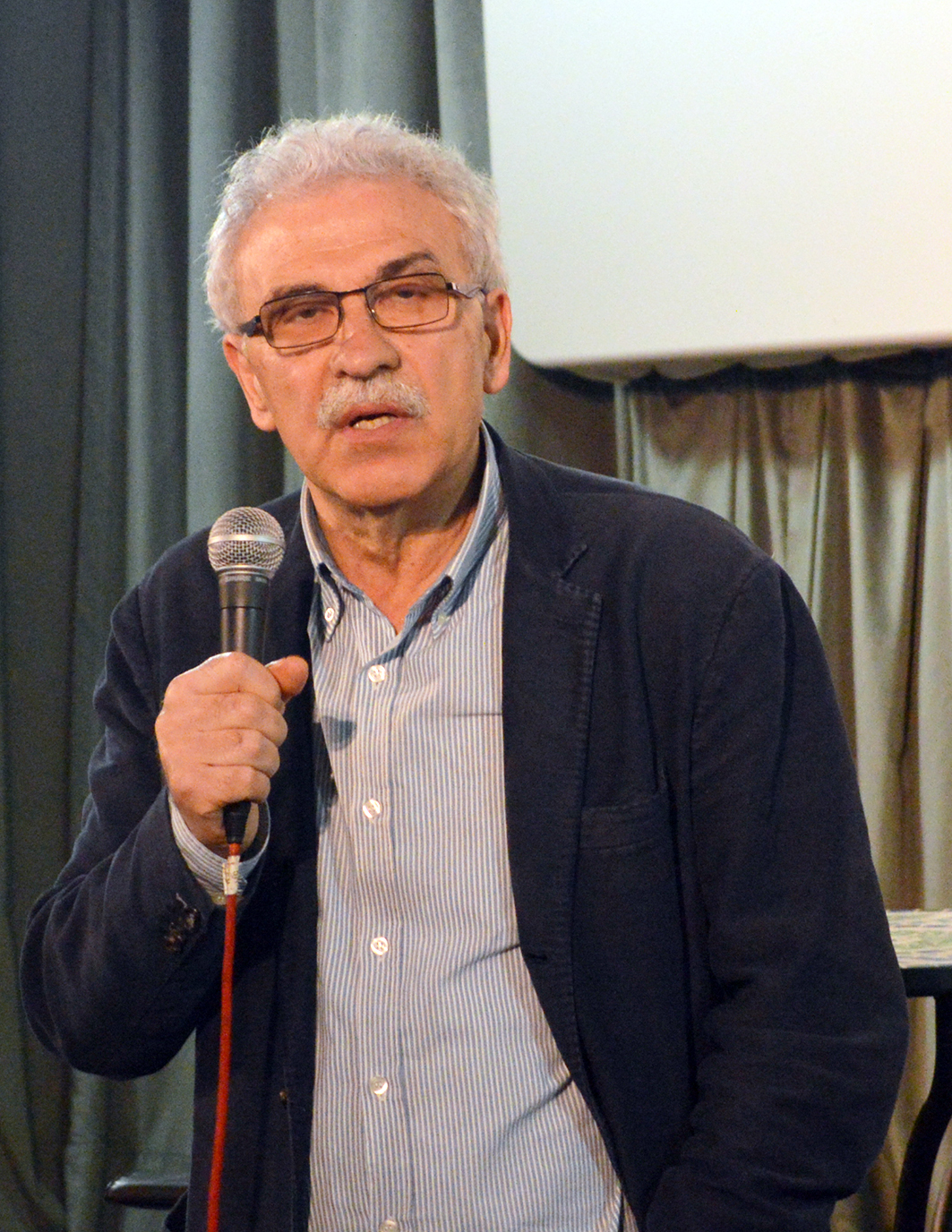 Incontro con lo Scenografo Giancarlo Basili. Ex-Allievo Istituto Statale d’Arte Preziotti di Fermo. Progetto di allestimento del Paglione Zero di EXPO Milano 2015, EXPO Shanghai 2010.